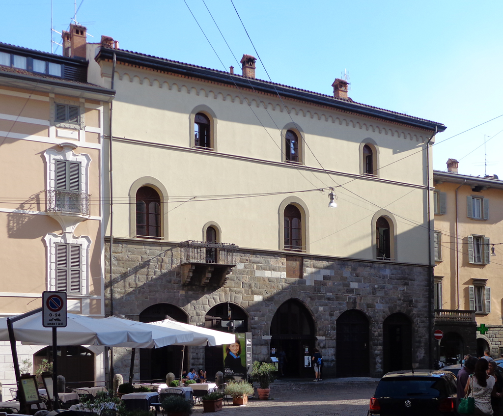 Stazione superiore della funicolare di Bergamo Città Alta, la facciata su piazza Mercato delle Scarpe.